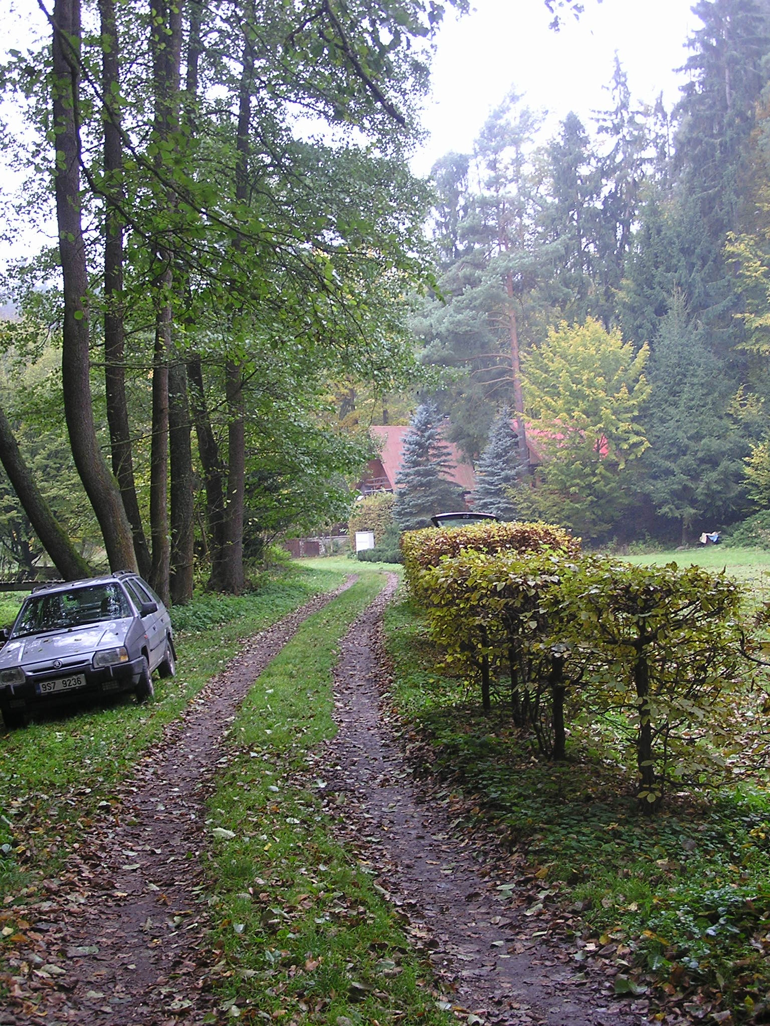 Cesta kudy vede NS Údolí Ticha